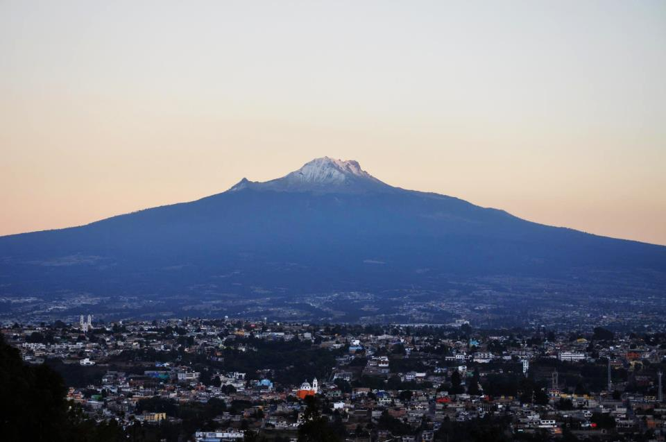 Volcan la Malinche y Ciudad de Tlaxcala